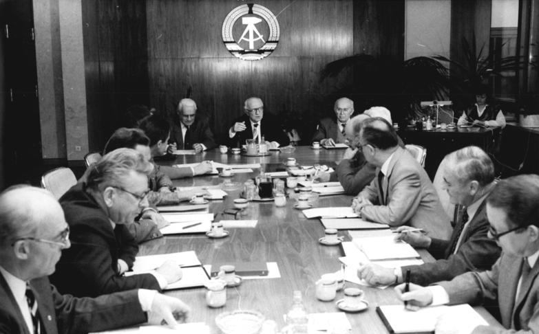 ADN-ZB/Settnik 29.11.1988 Berlin: Präsidium Das Präsidium der Volkskammer der DDR hat die 7. Tagung der Volkskammer für den 14.12.88 nach Berlin einberufen. Auf der vom Präsidenten der Volkskammer, Horst Sindermann (hintere Reihe m.), Mitglied des Politbüros des ZK der SED, geleiteten Sitzung wurde der Vorschlag für die Tagesordnung bestätigt. (Hintere R. l. Gerald Götting, Vizepräsident der Volkskammer, r. Erich Mückenberger, Mitglied des Präsidiums der Volkskammer und Mitglied des Politbüros des ZK der SED).